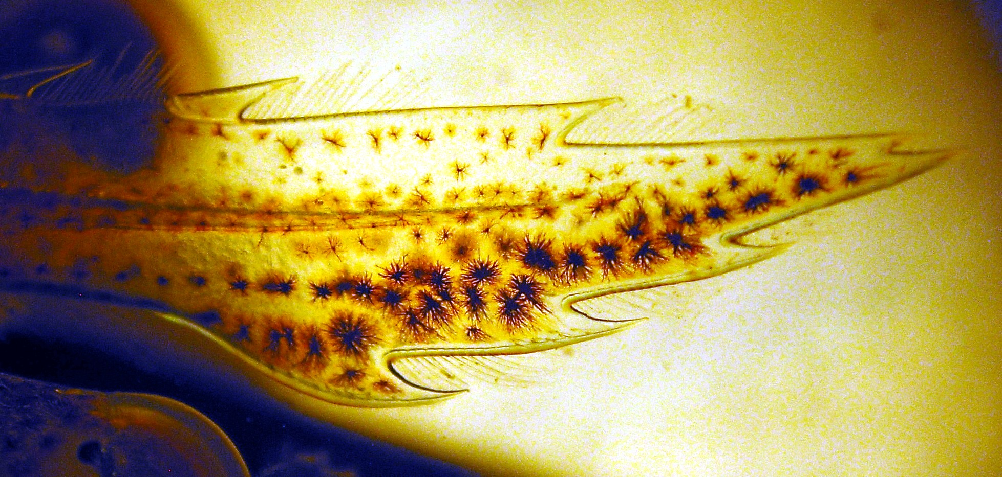 Rostre de la crevette Palaemon adspersus. Chomatophores marron-noir à sur le moitié inférieure.